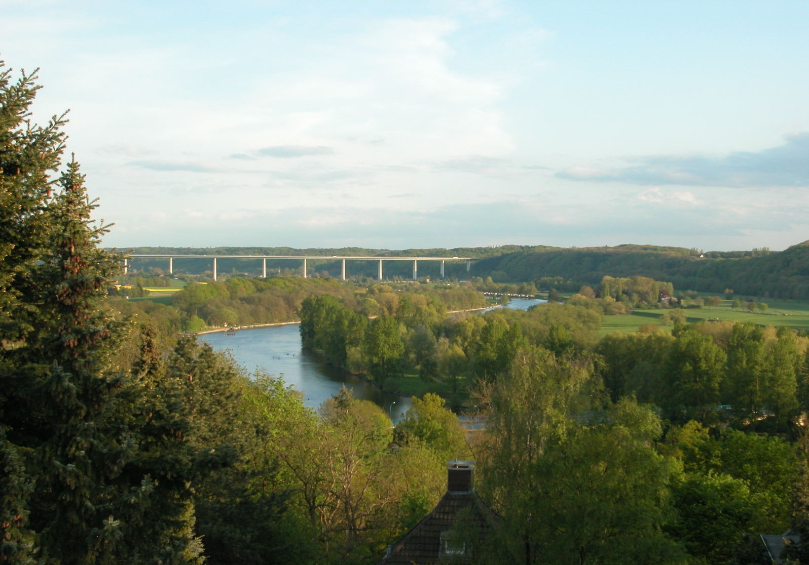 Mülheim an der Ruhr, Ruhrtal, Blickrichtung: S Standortkoordinaten:51°24′43.56″N 6°53′33.6″E / 51.4121°N 6.892667°E